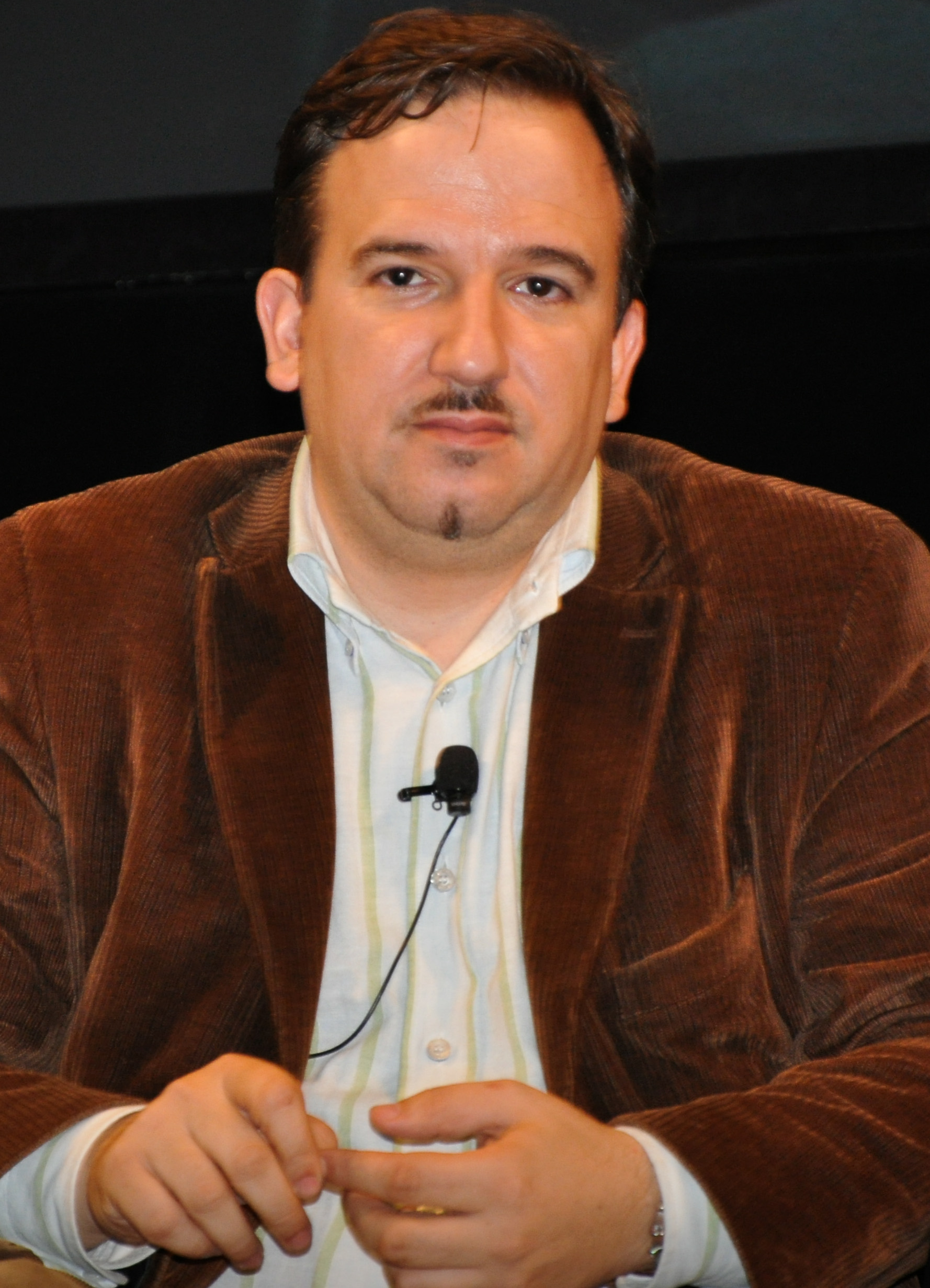 Luca Telese